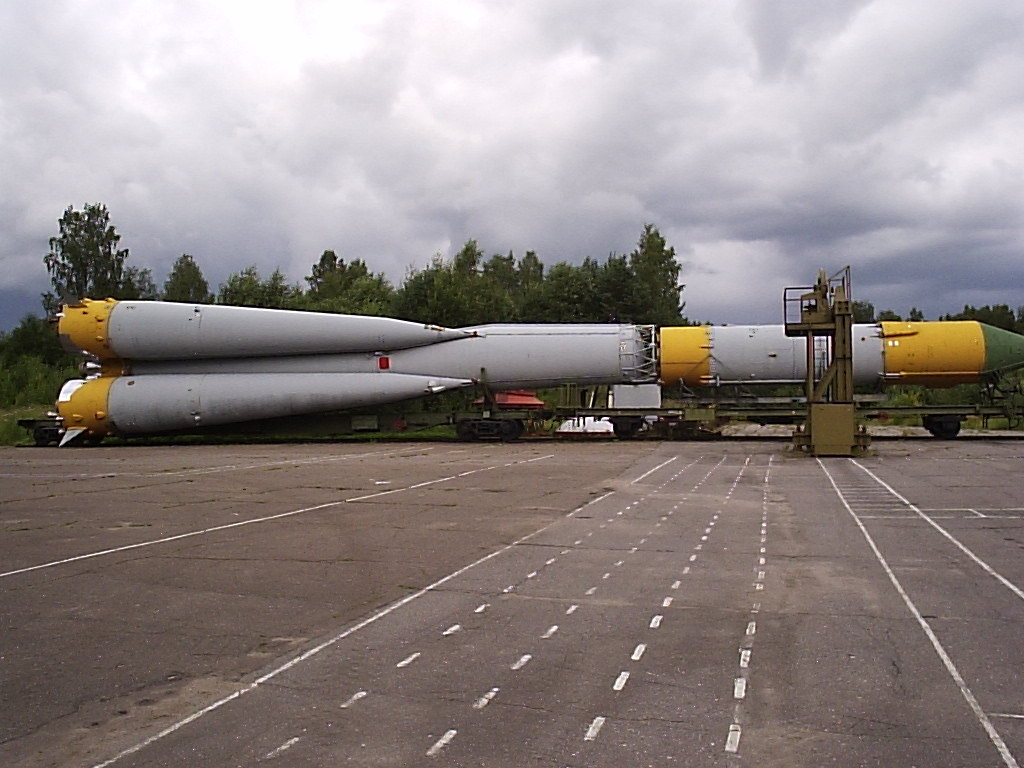 Molniya launch vehicle